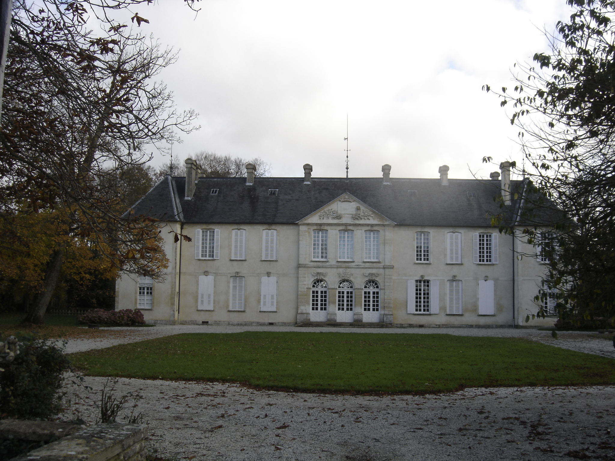 Château de la Noë. Construit vers 1742 par Pierre Gaucher, Sieur de la Noë, il a été restauré au XIXe siècle. Il est très représentatif de l'architecture de l'époque de Louis XV. .